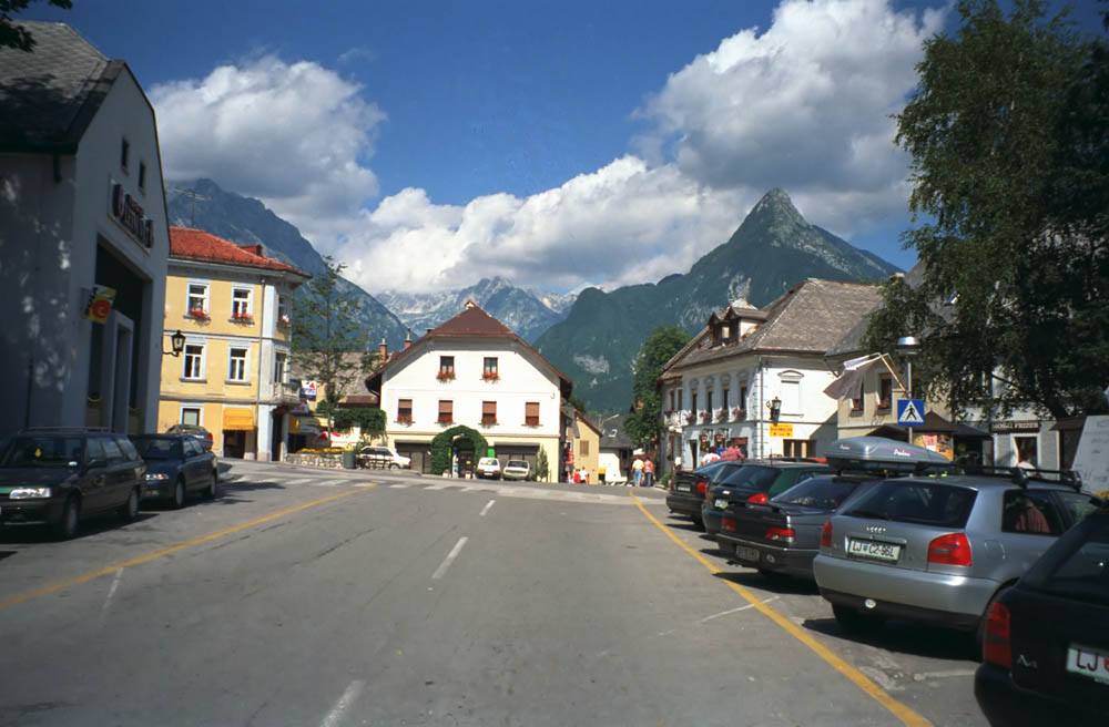 Bovec, fotografiert im Sommer 1997 von Bernd Gehrmann, Lizenz: GFDL